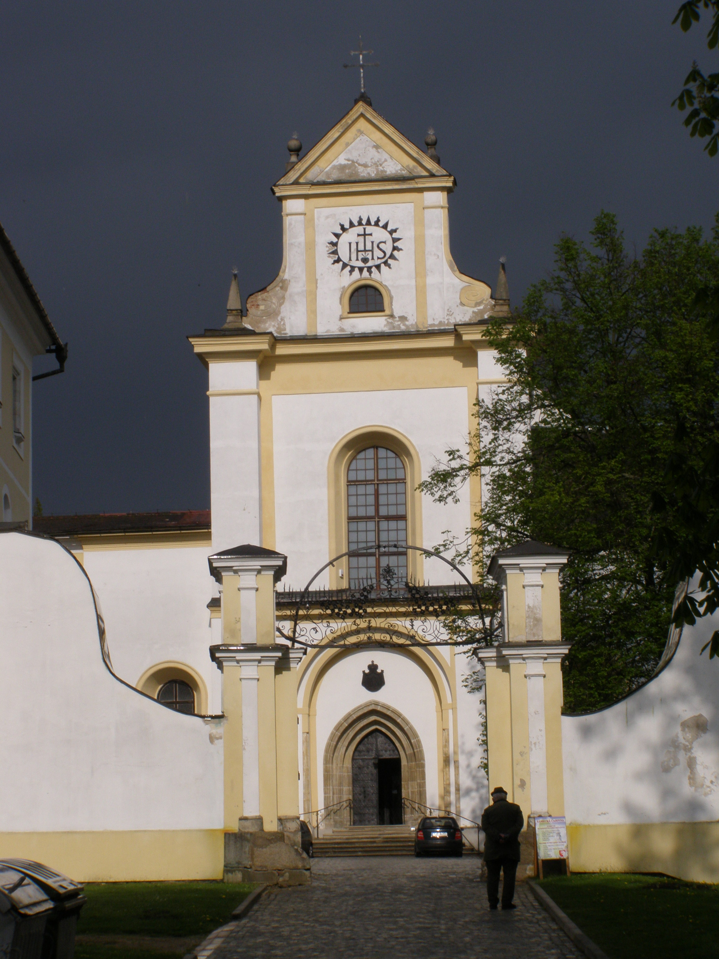 Česky: Žďár nad Sázavou, zámek, konventní kostel Nanebevzetí Panny Marie